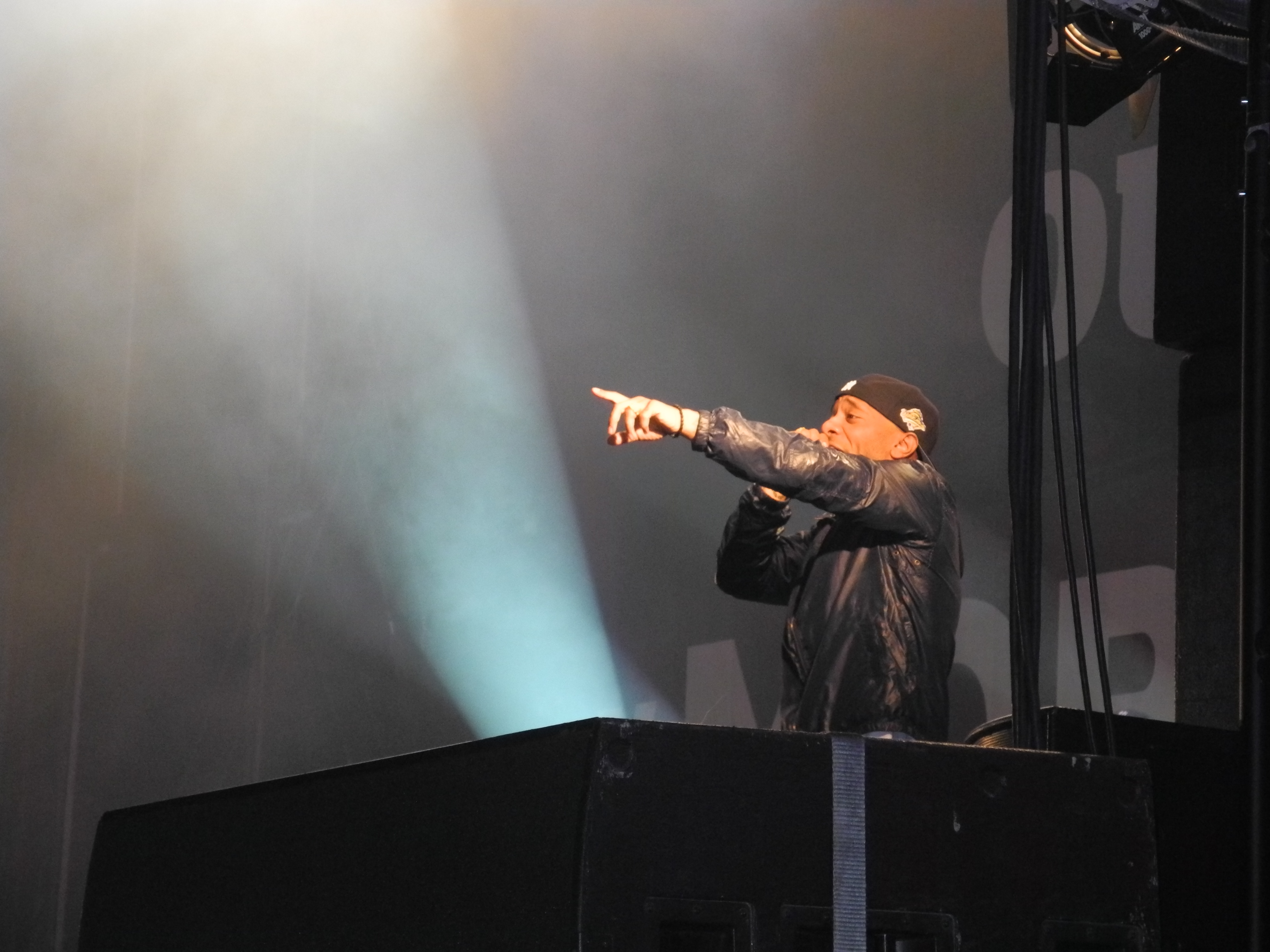 Prodigy von Mobb Deep